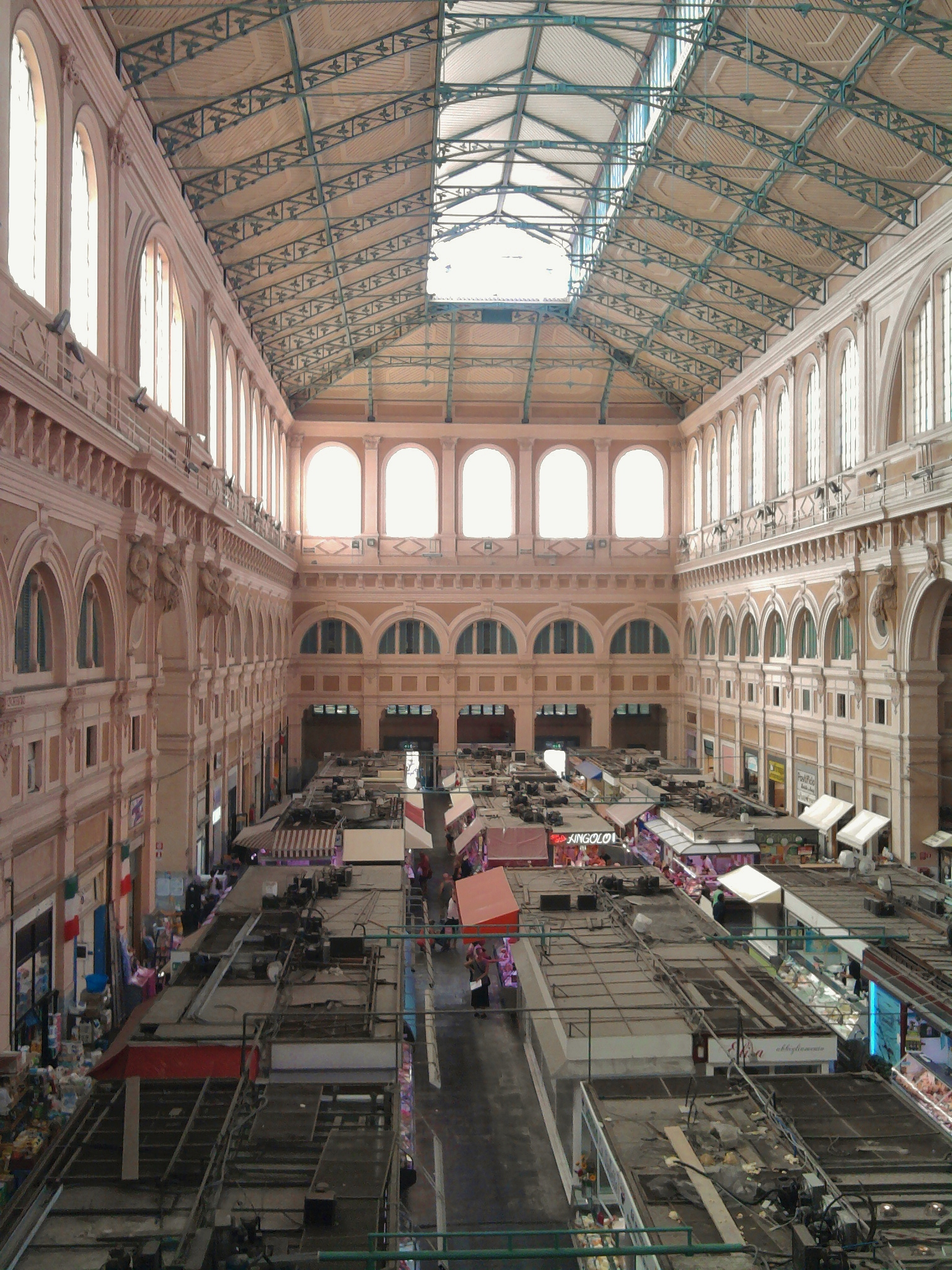 Livorno, il Mercato delle Vettovaglie, detto anche Mercato Coperto o Mercato Centrale. Veduta del salone principale, lungo quasi 100 metri e altro circa 35 metri, risalente al 1894.